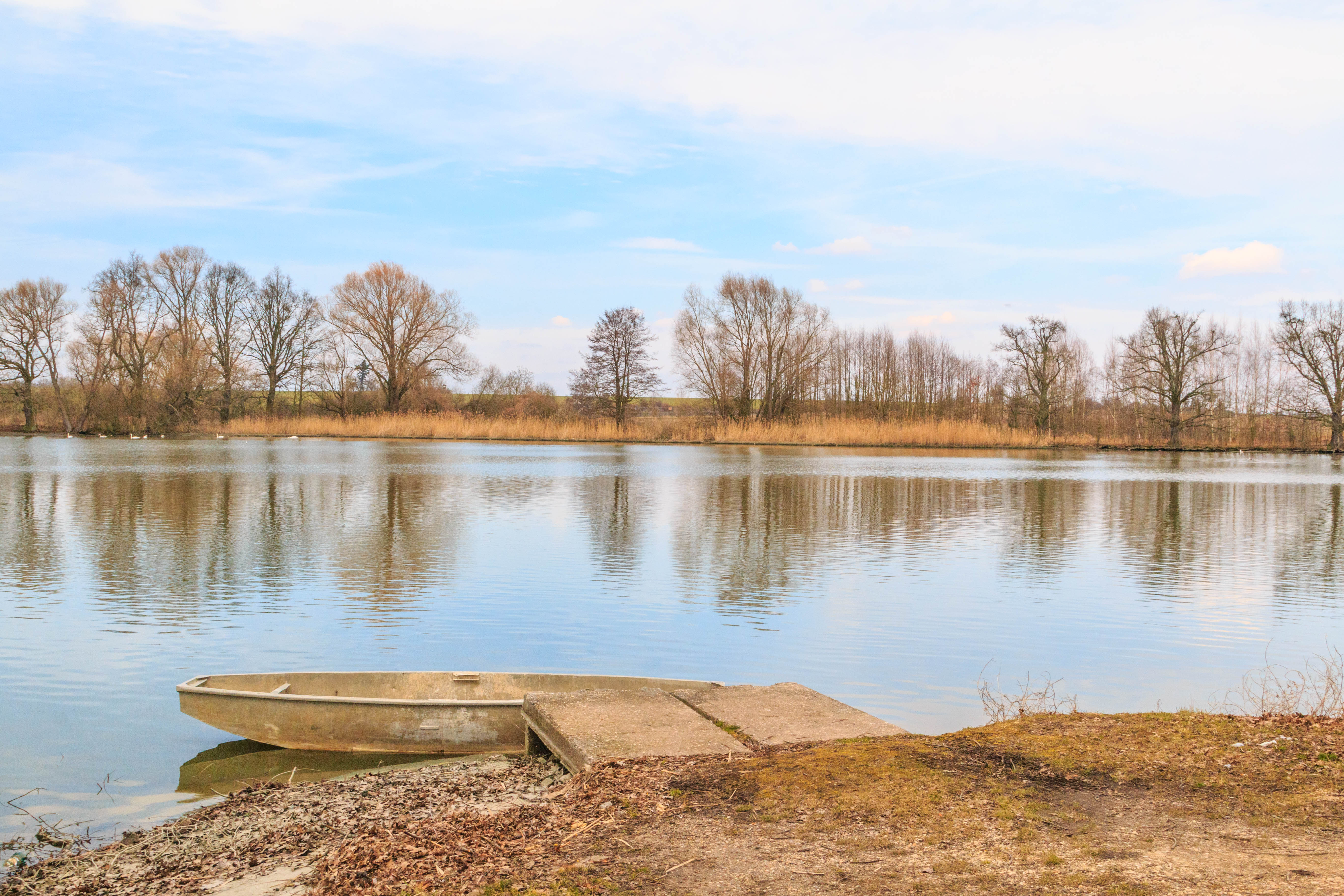 Vítkovský rybník v Chlumci nad Cidlinou Project: Vodstvo.